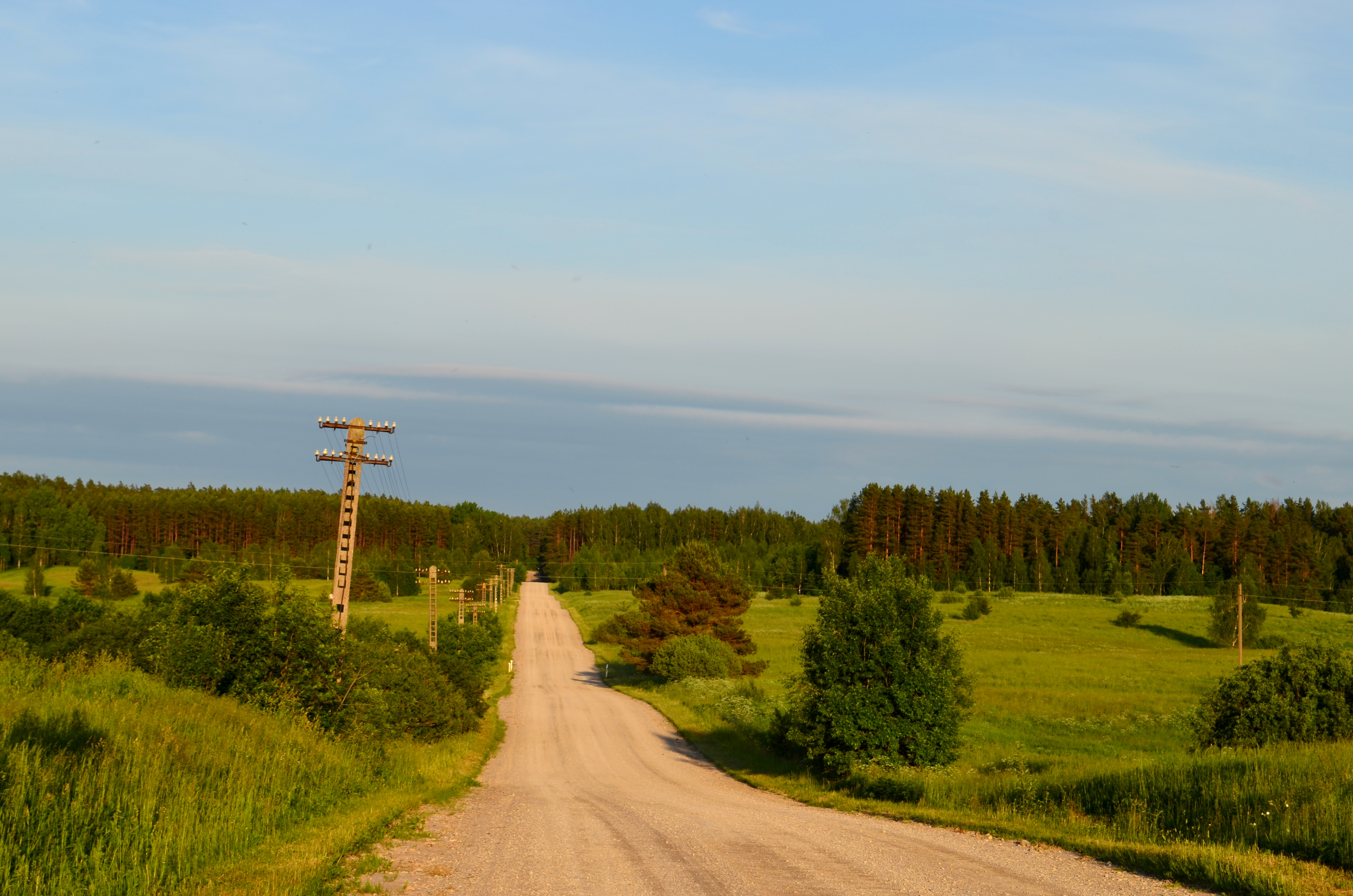 Kelias į Minčios girią prie Sirvydžių, Utenos r.